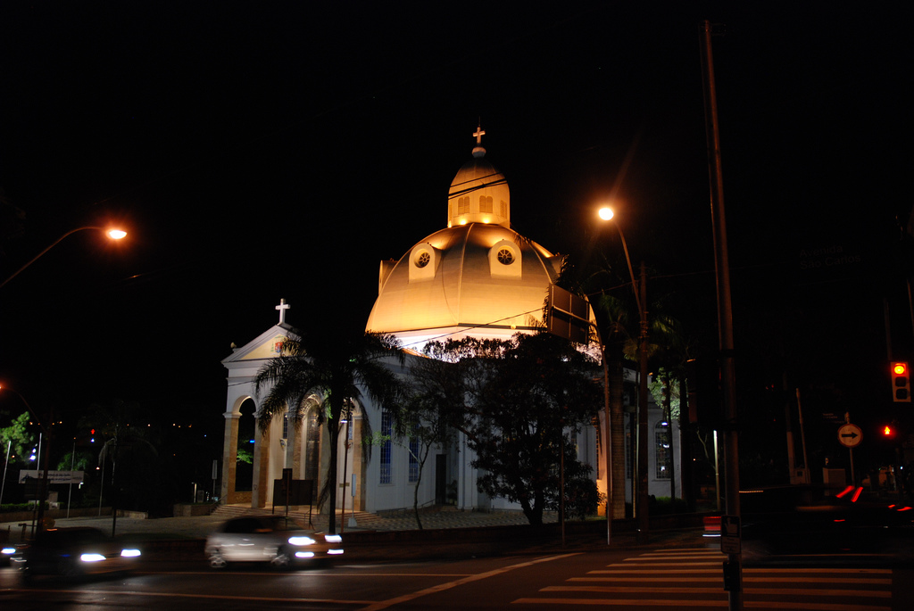 Com iluminação inaugurada em 2009, a Catedral é um lugar que que produz belas imagens.